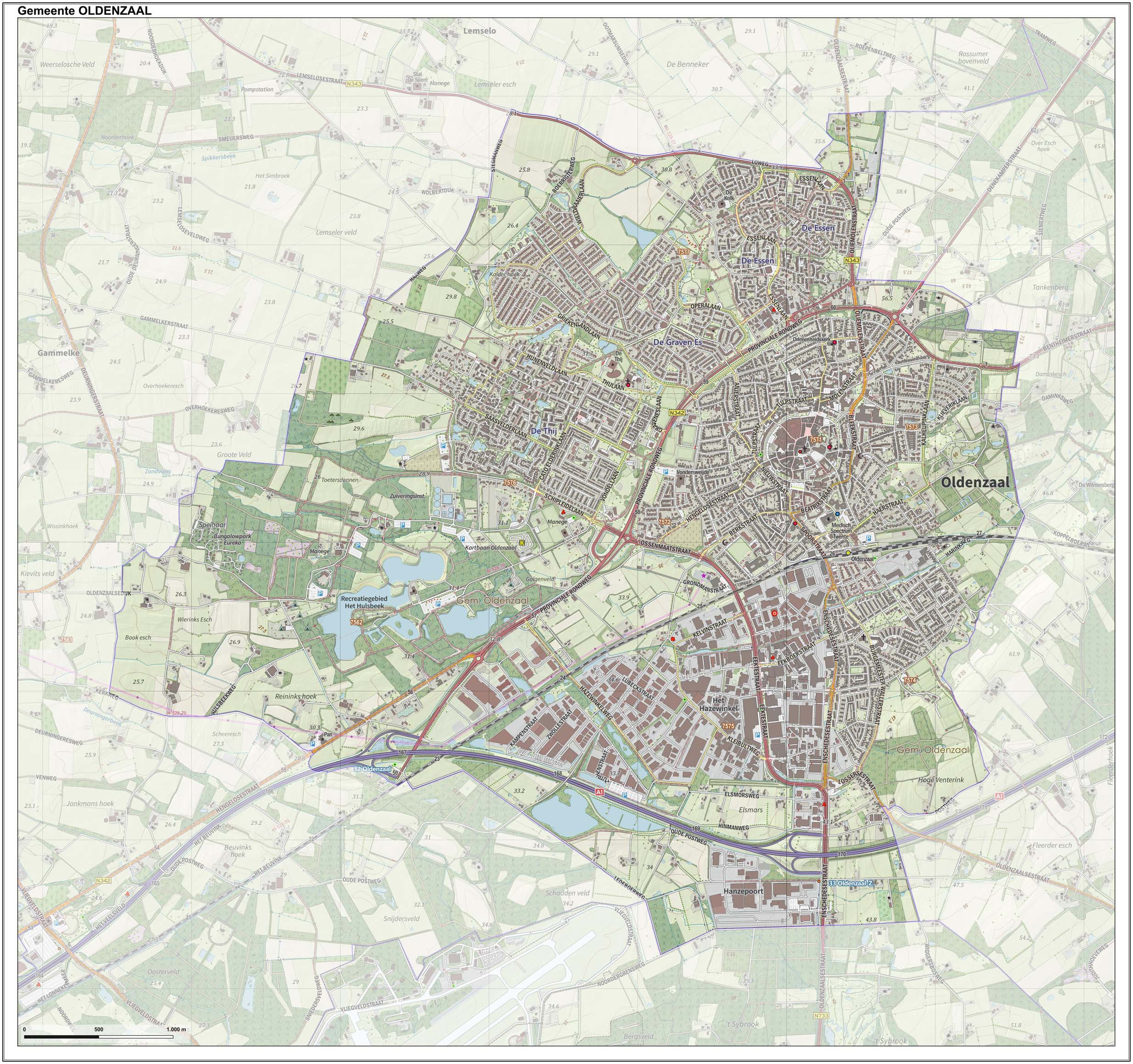 Topografische gemeentekaart. Resolutie: 400 pixels/km. Kaartbeeld samengesteld uit de open geodata van de Top10NL en Top25namen (Kadaster), Creative Commons-BY licentie. Gebouwvlakken uit open geodata BAG extract. Wegen uit de OpenStreetMap, OpenStreetMap community. Reliëfschaduw uit de Actuele Hoogtekaart AHN2. Samenstelling en kleurenschema: Jan-Willem van Aalst, met QGIS. Zie ook de Legenda.